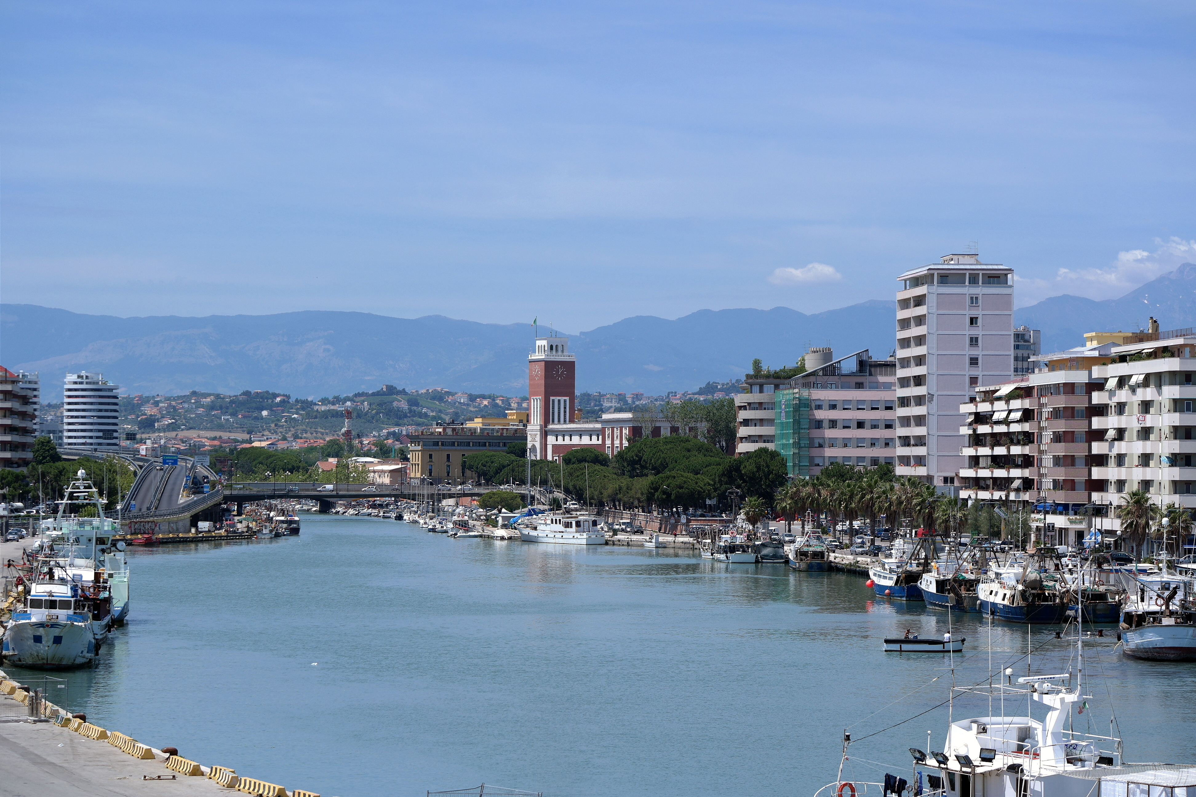 Foce del fiume Pescara dal ponte del mare e sullo sfondo la Torre del Municipio